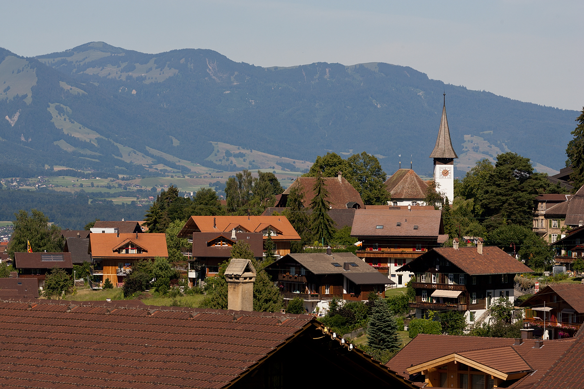 Sigriswil